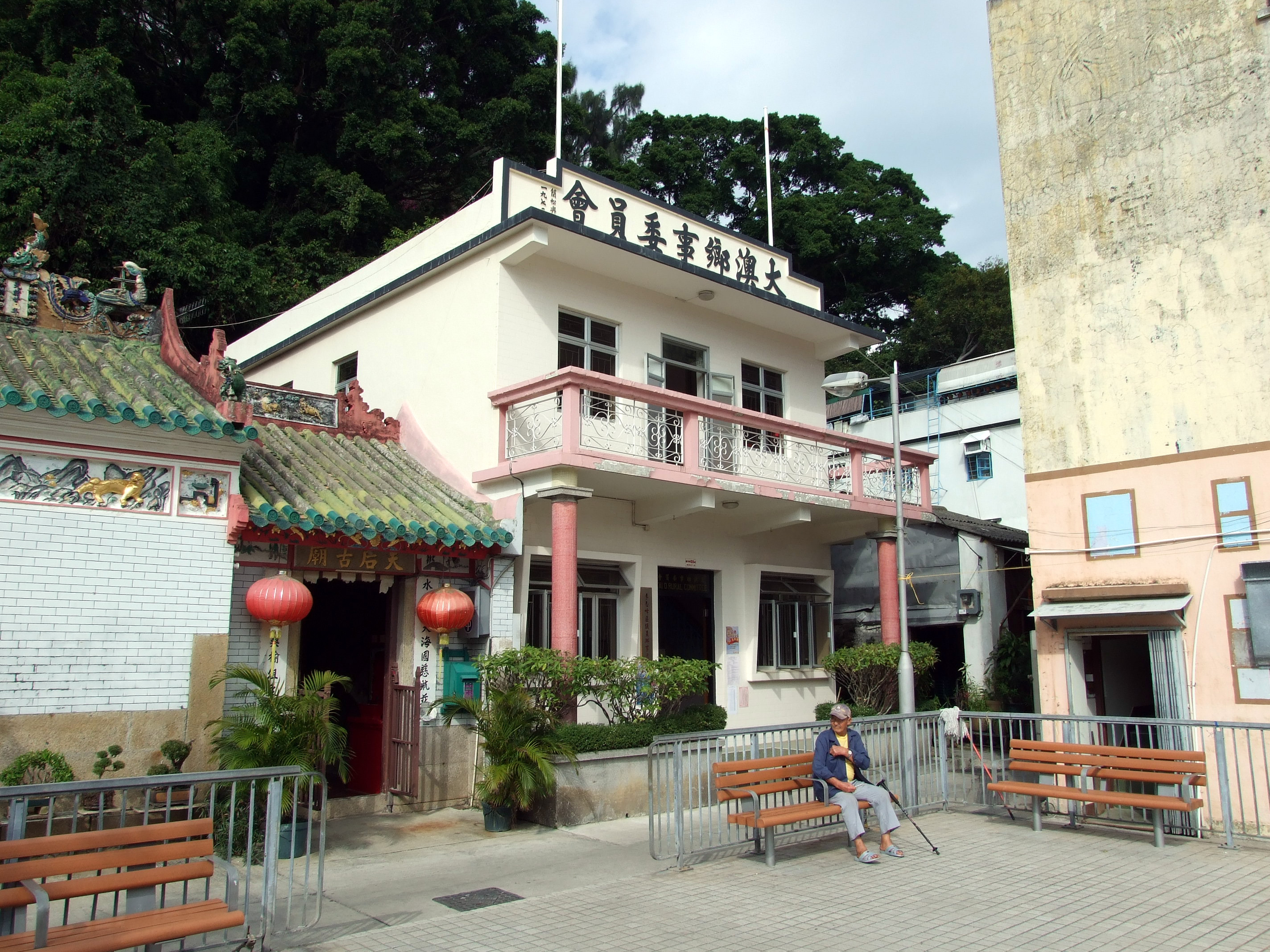 中文（香港）: 大澳鄉事委員會